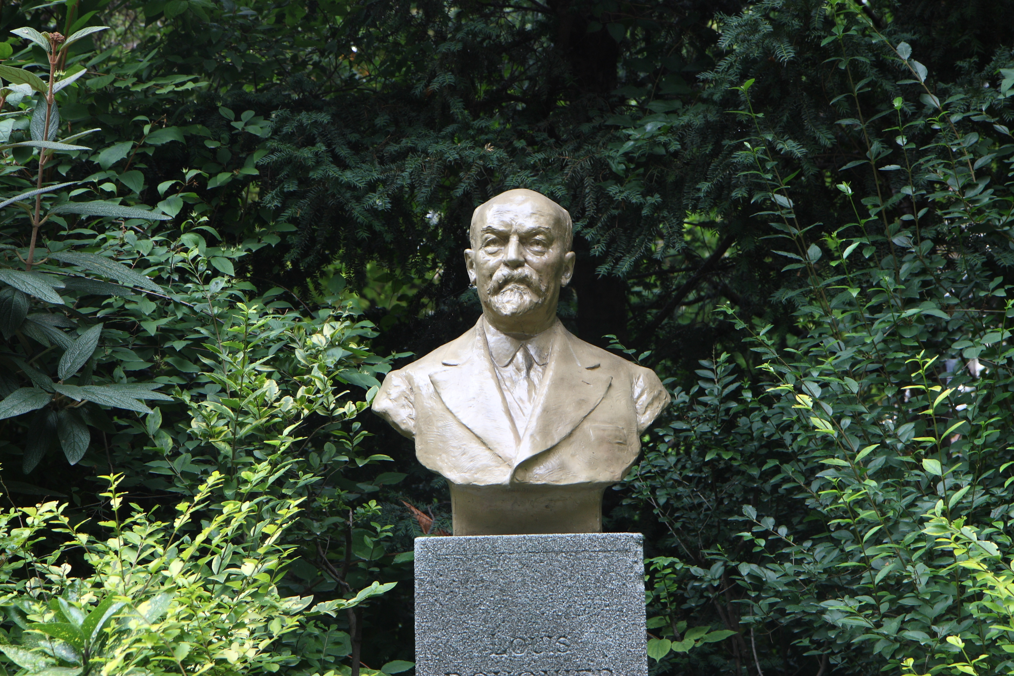 buste2